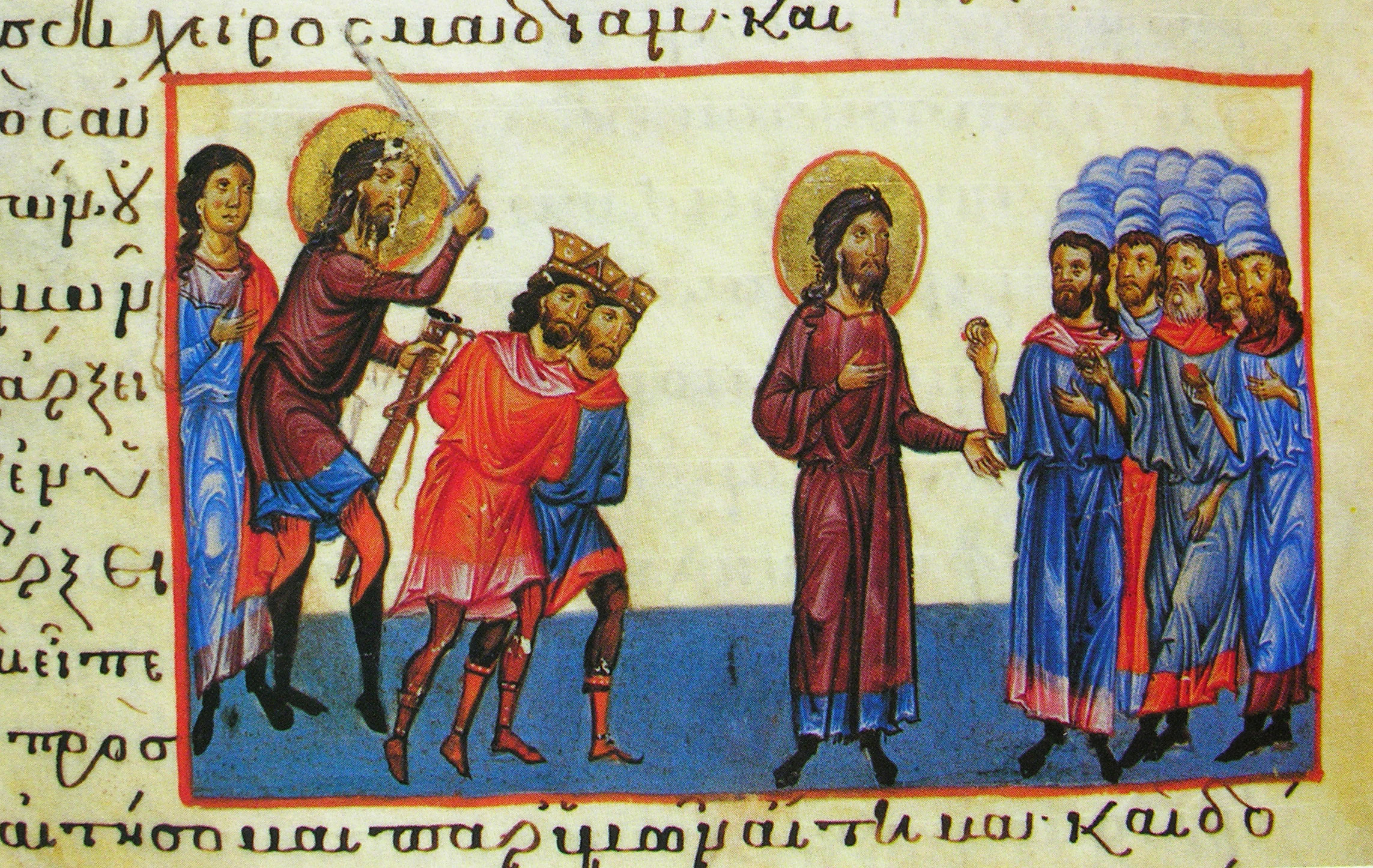 Гедеон убивает Зевея и Салмана, правителей Мадиамских; Византия; XIII в.; памятник: Октатевх или Восьмикнижие (Athos, Vatop. 602); 21 x 34 см.; местонахождение: Греция. Афон. Ватопедский монастырь